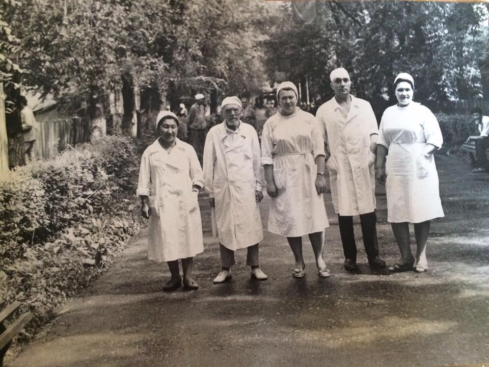 Рыскулова Какиш со своим наставником, профессором Кругловым А.Н. и коллеги